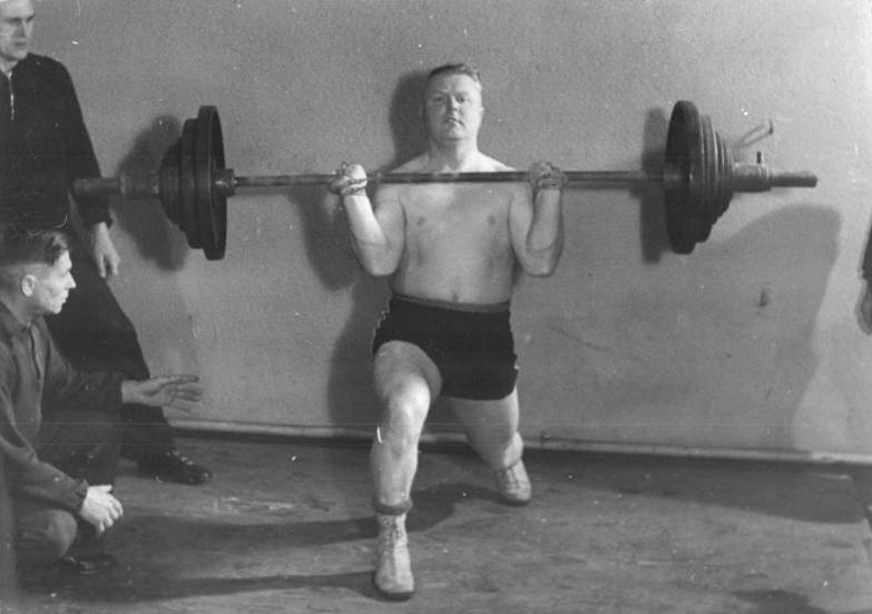 Fritz Lorenz Zentralbild Biscan Zi-Be. 15.8.1952 Meister seines Berufs - Meister im Sport. Fritz Lorenz, Dachdeckermeister in Calbe - Sachsen, ist nicht nur ein Meister seines Berufes, sondern auch gleichzeitig einer der besten Schwerathleten Deutschlands, Titelhalter von acht DDR-Rekorden und einem gesamtdeutschen Rekord. Für die Weltfestspiele trainierte er mit dem sowjetischen Schwerathleten, Sascha Bucharow, die deutsche Schwerathletik-Staffel. Lorenz hat von seinem sowjetischen Kollegen viel gelernt und vermittelt seine Kenntnisse nun der BSG "Motor" Magdeburg, der erfolgreichsten Betriebssportgemeinschaft (BSG) . UBz: Fritz Lorenz beim zweiarmigen Stoßen von 155 Kilo, und zwar im Augenblick des Umsetzens.